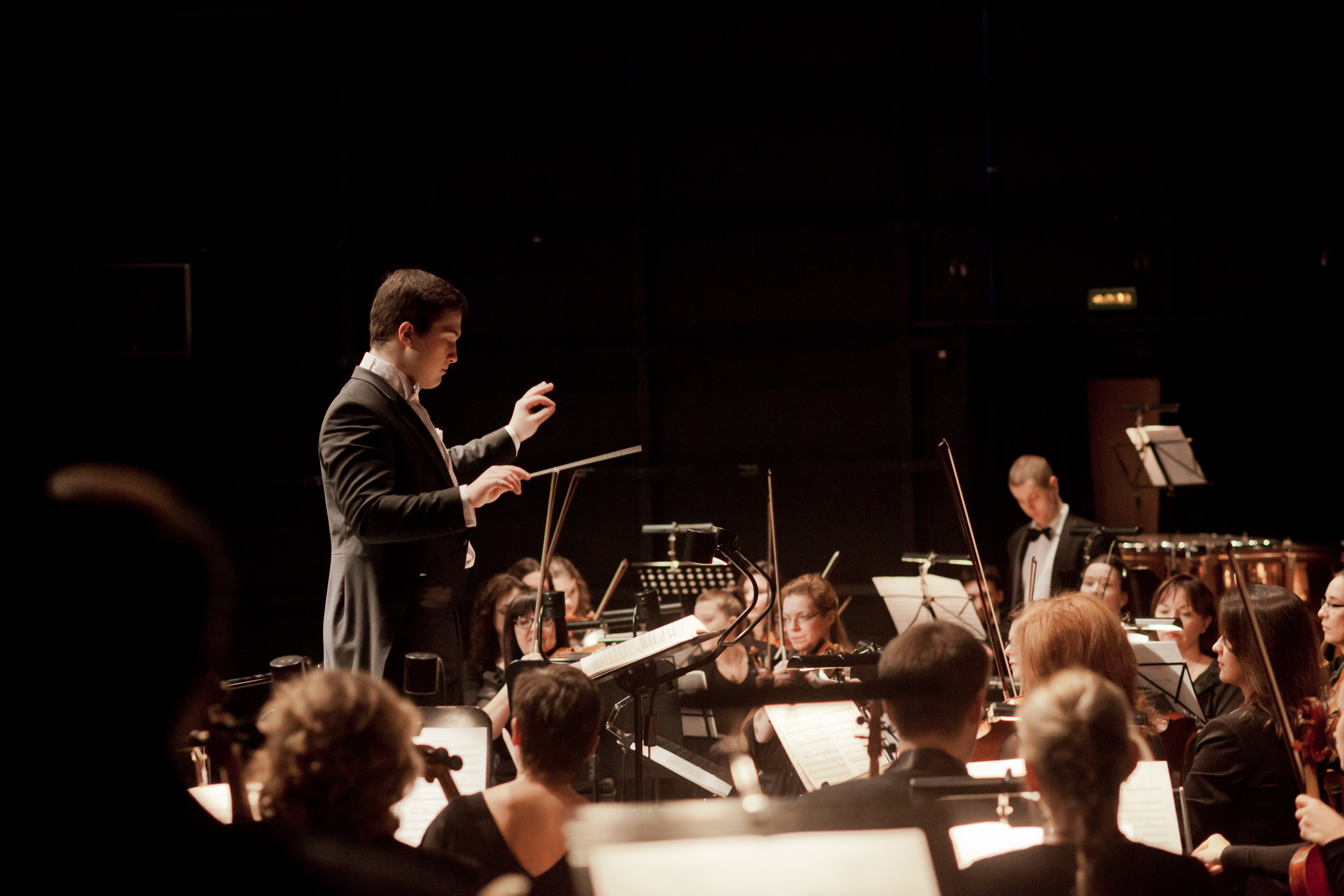 Дирижёр Тимур Зангиев